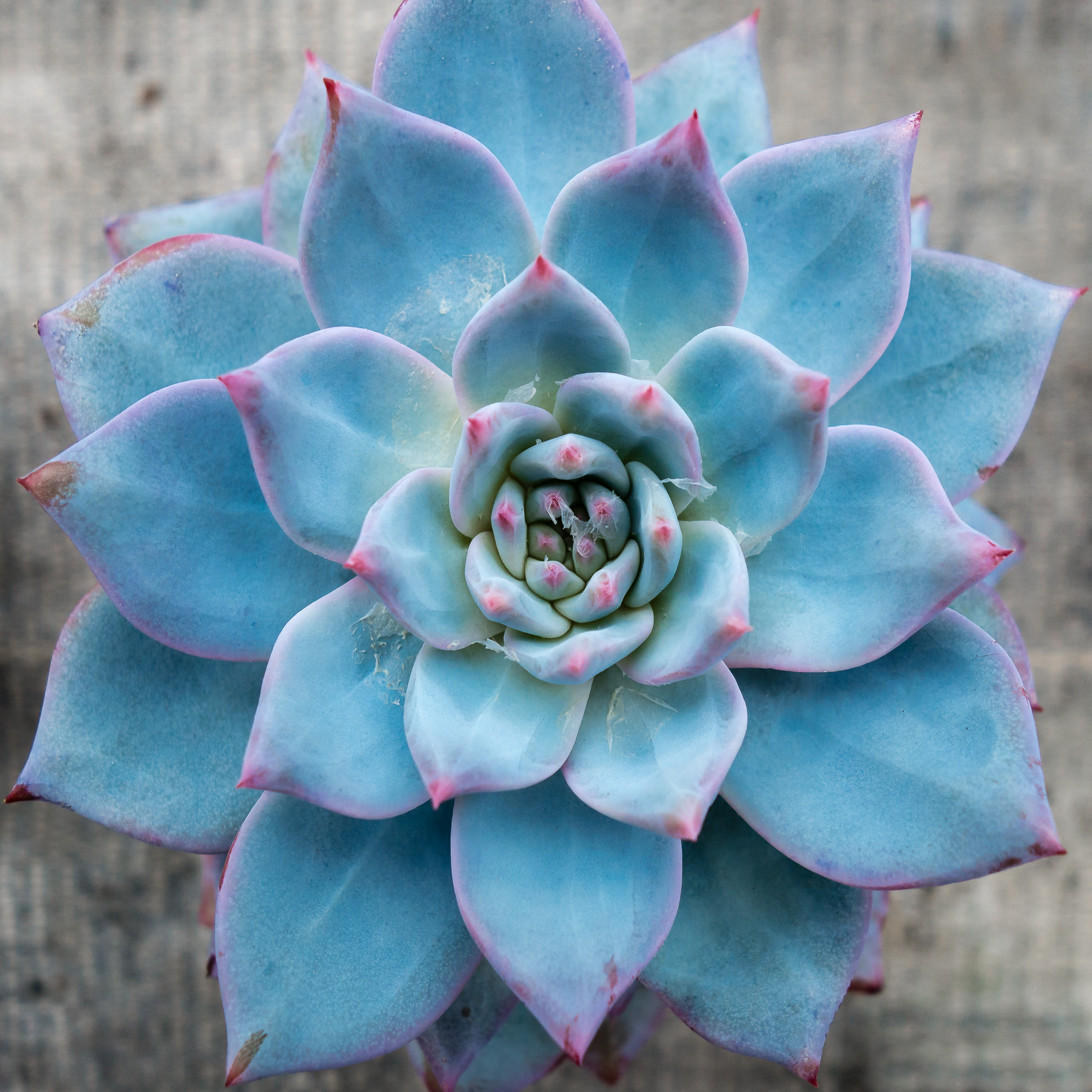 Echeveria elegans in the ‘Kakteenland Steinfeld’.